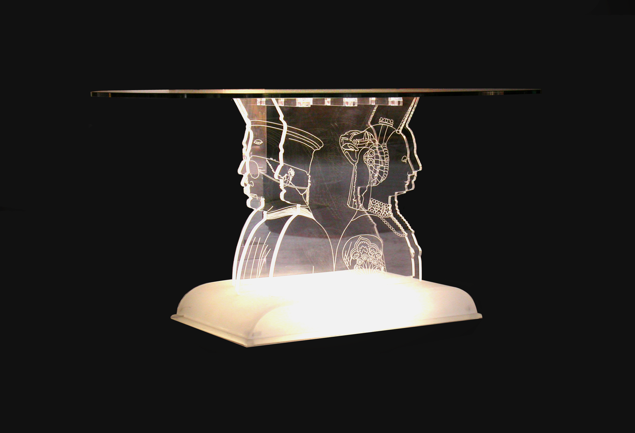 artdesign: Tavolo Battista e Sforza